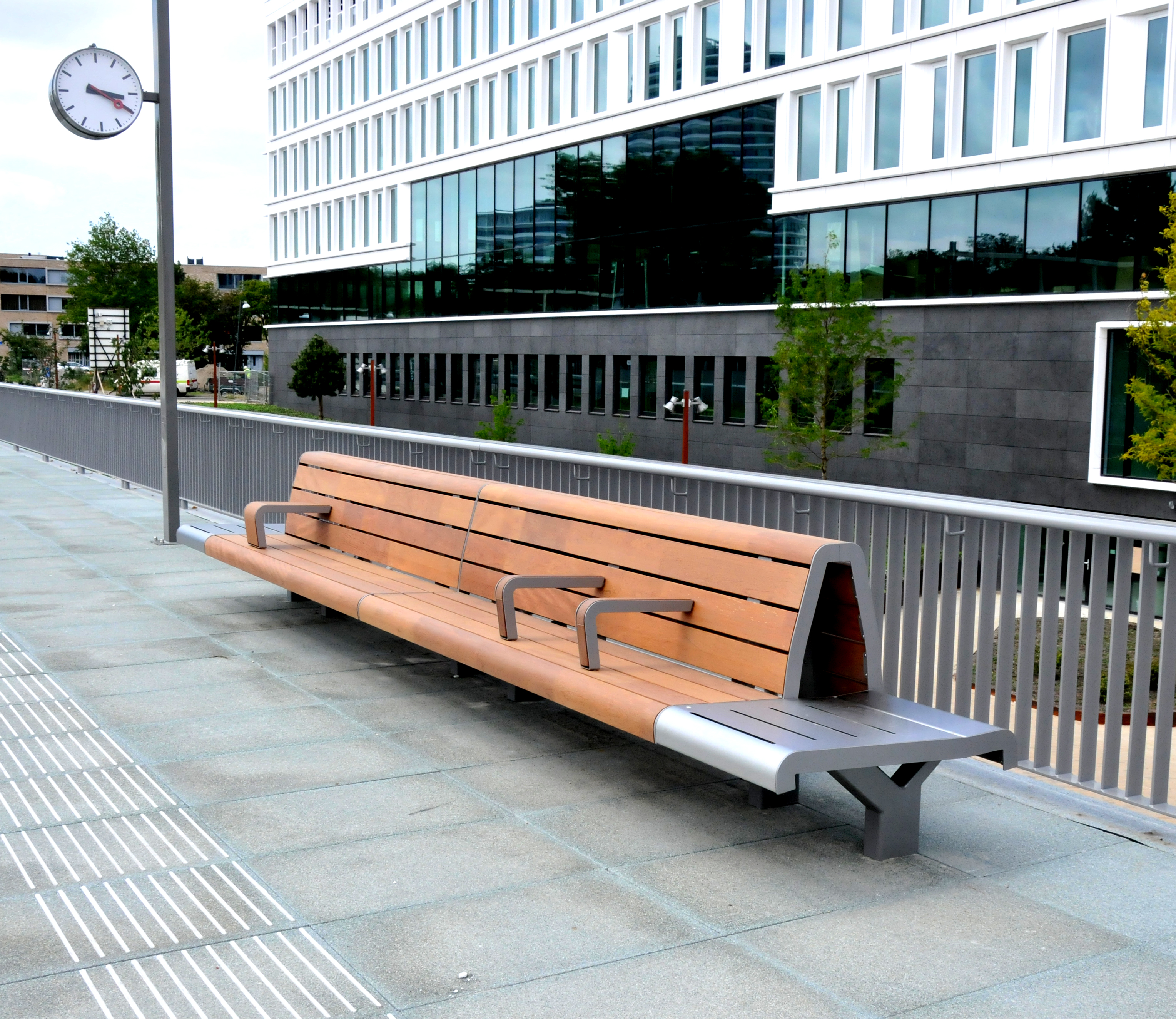 Bank op Station Groningen Europapark